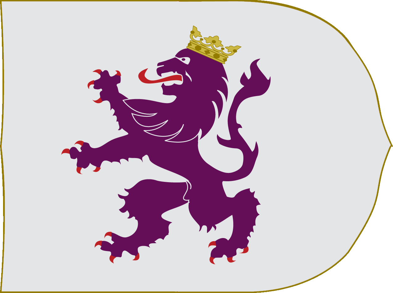 Estandarte del Reino de León, creado a partir de Image:Escudo de Leon.png y de Image:Estandarte de la Corona de Castilla.png. Fuente bibliográfica: La Bandera Medieval del Reino de León, Ricardo Chao Prieto. Banderas nº98, Sociedad Española de Vexilología, [1]